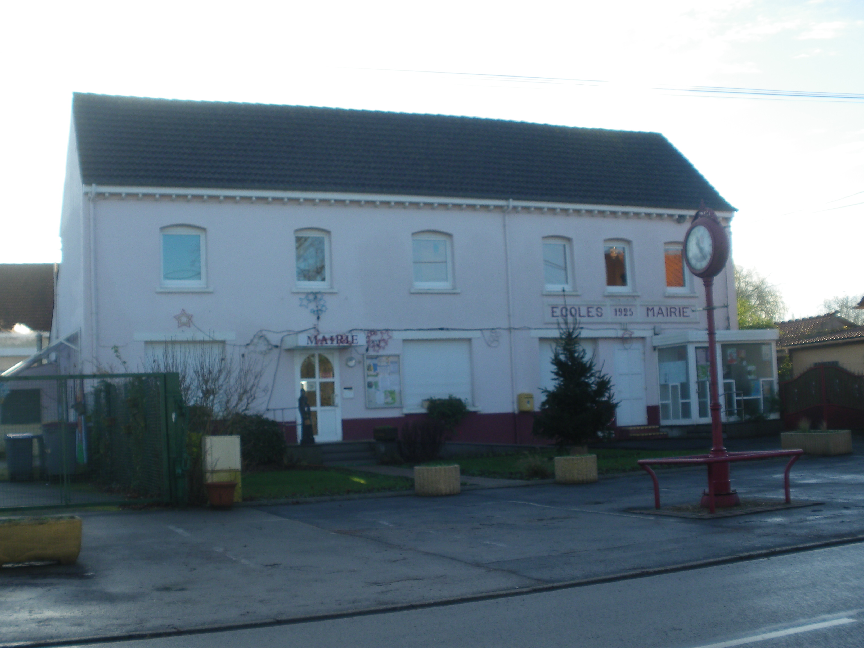 Vue de la mairie de Vieille-Chapelle.